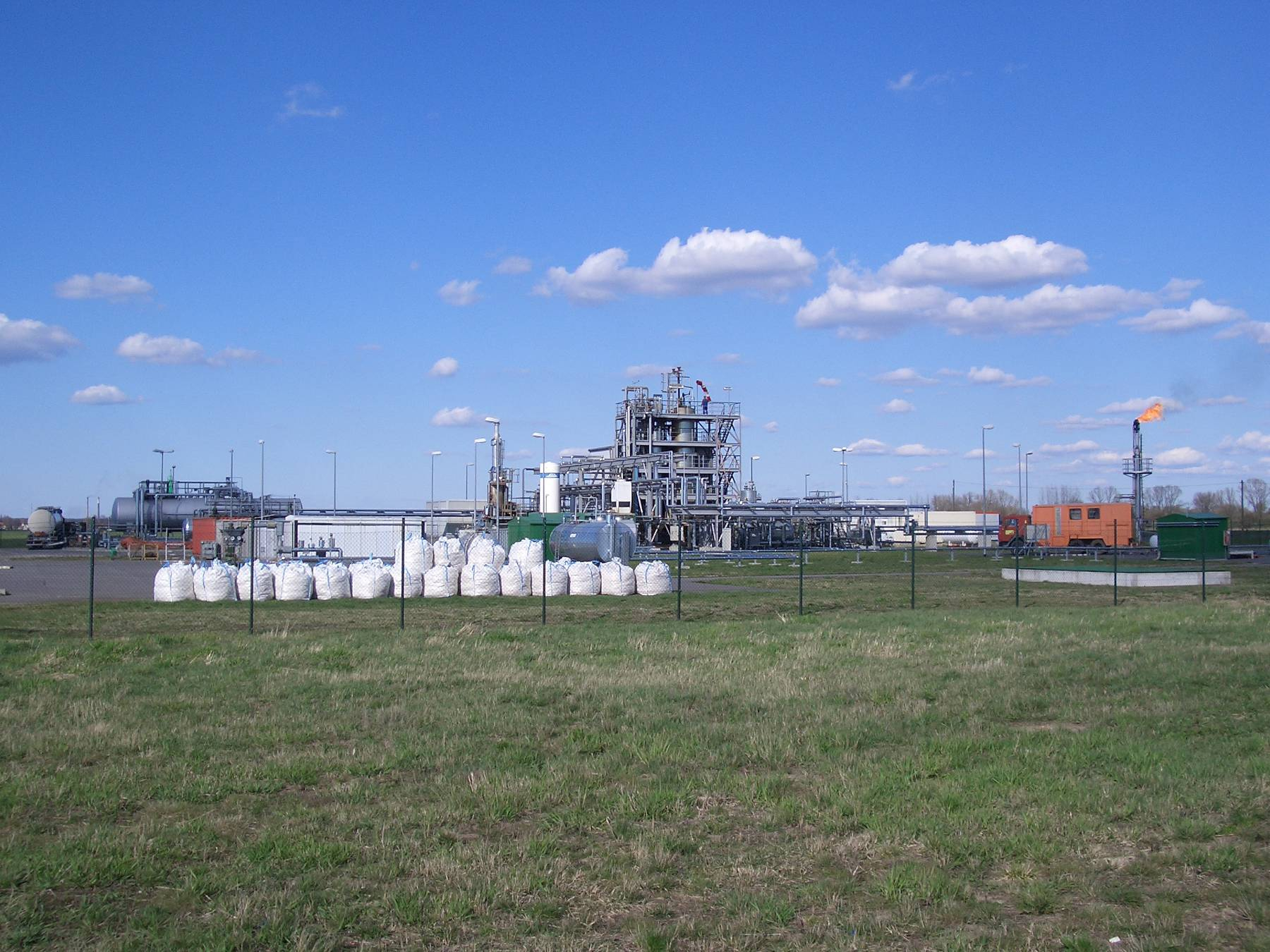 Erdgasförderanlage bei Manschnow